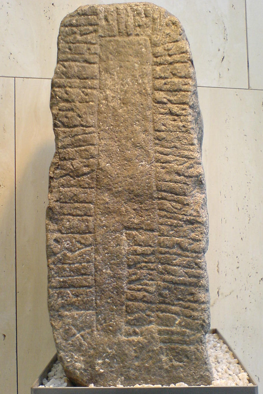 Kamień runiczny ze zbiorów Uniwersytetu w Oslo